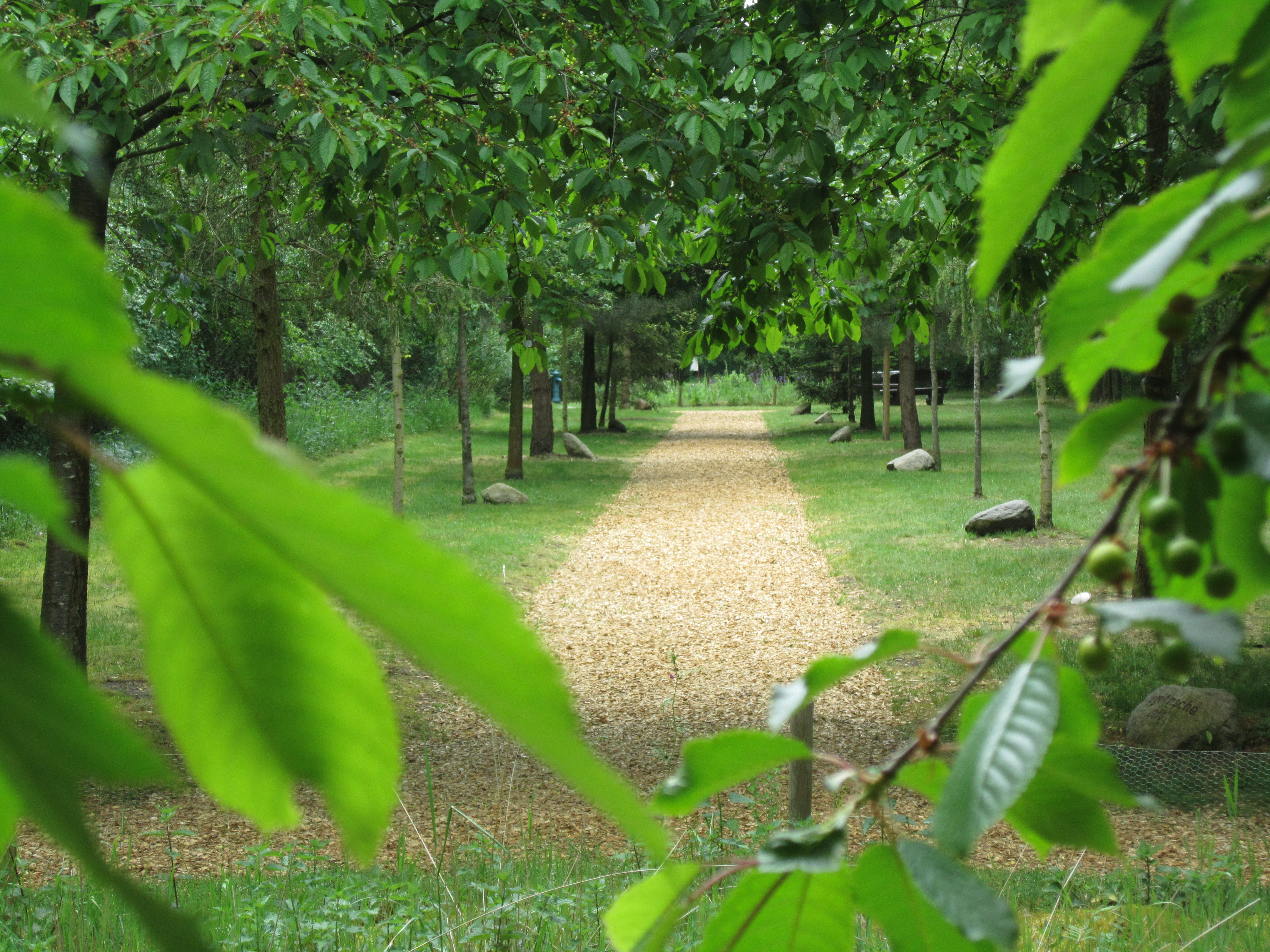 1968 angelegter Rundweg "Baum und Natur" neben dem Wasserwerk des "Oldenburgisch-Ostfriesischen Wasserverbandes" in Fladderlohausen (Gemeinde Holdorf im niedersächsischen Landkreis Vechta). An der zentralen Allee stehen die "Bäume des Jahres" seit 1989.